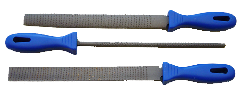 Râpe à bois Photographer Isabelle Grosjean ZA Date 2001-10-18 License GFDL-self Camera Sony PSC-P92 ZA